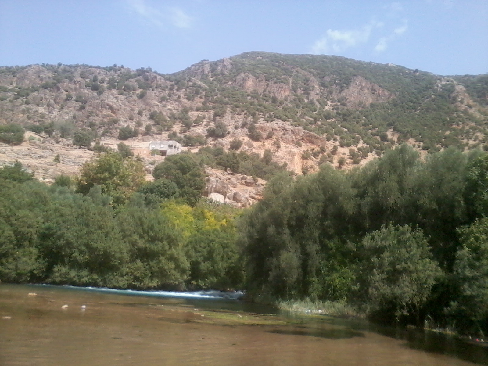 Entourage des sources Oum Errabia